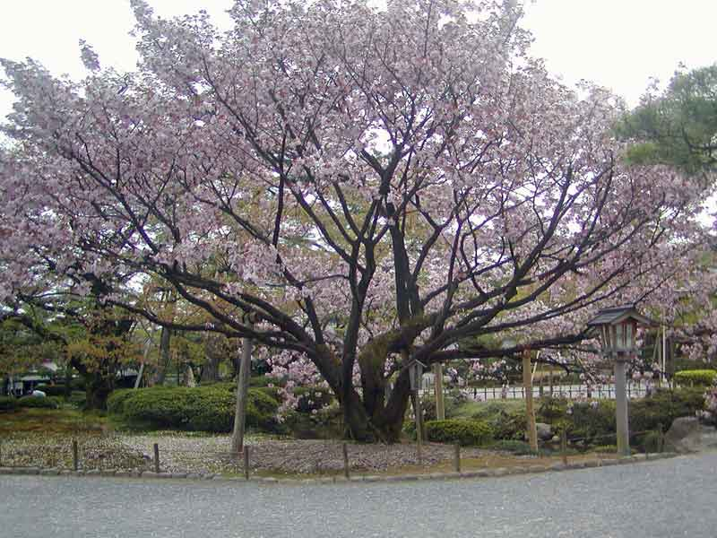 P. jamasakura Sieb. cv. Kenrokuen-kum agai, in Kenrokuen-kumagai photo Makimoto